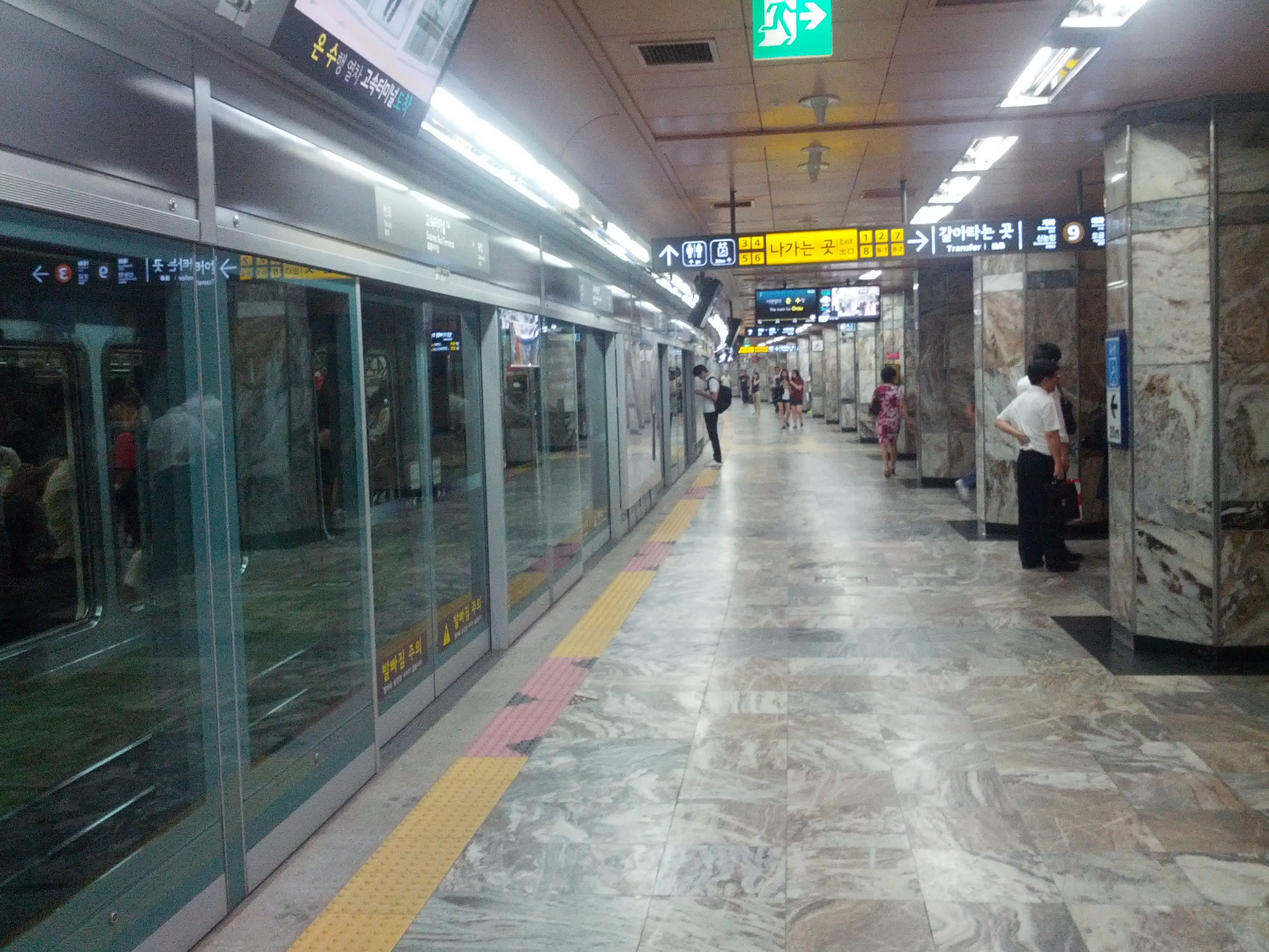 7호선 고속터미널역 역명판